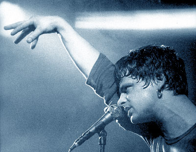 Per Øivind Houmb ( «Prepple») på studenthuset i Halden (Foto: )